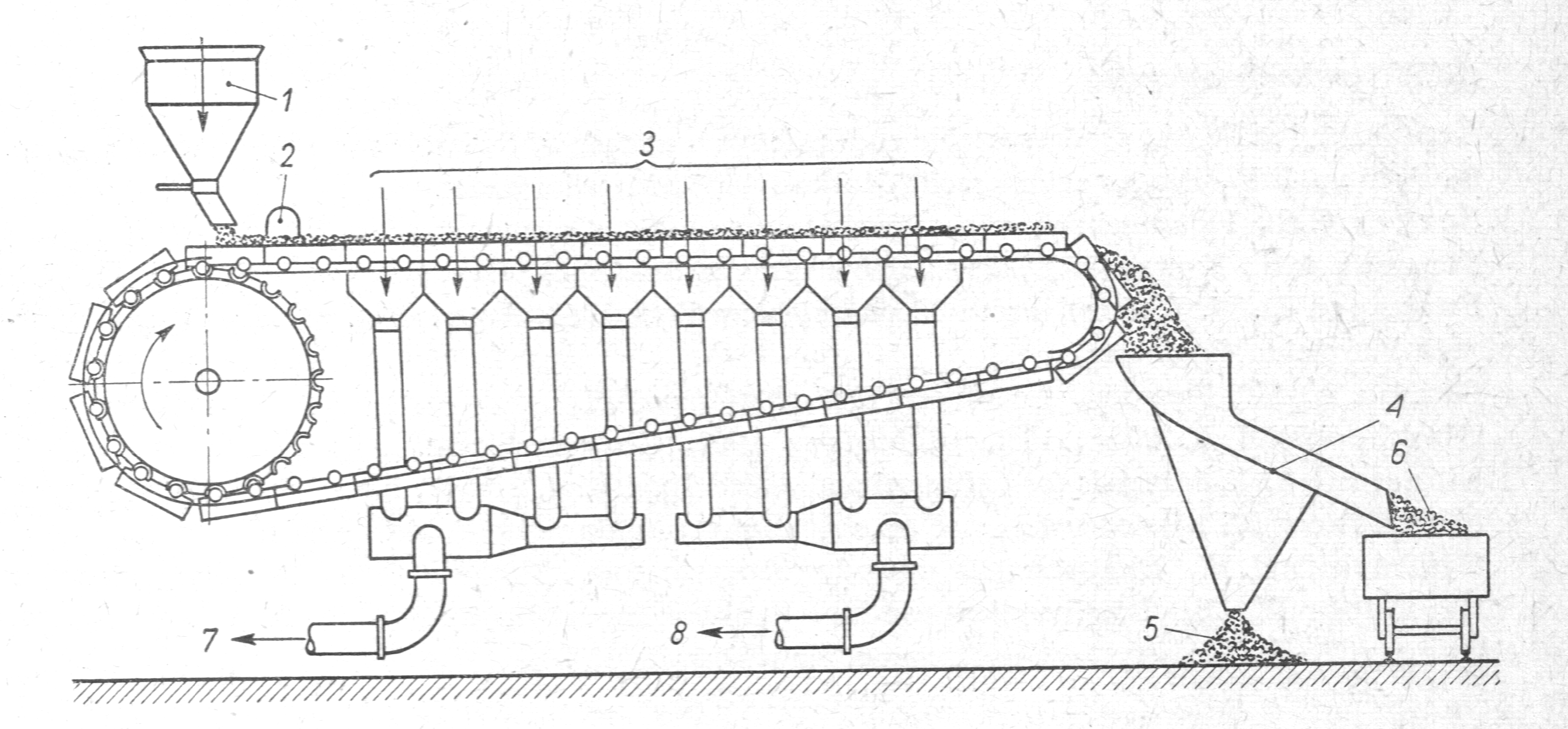 Aparat Dwight-Lloyda